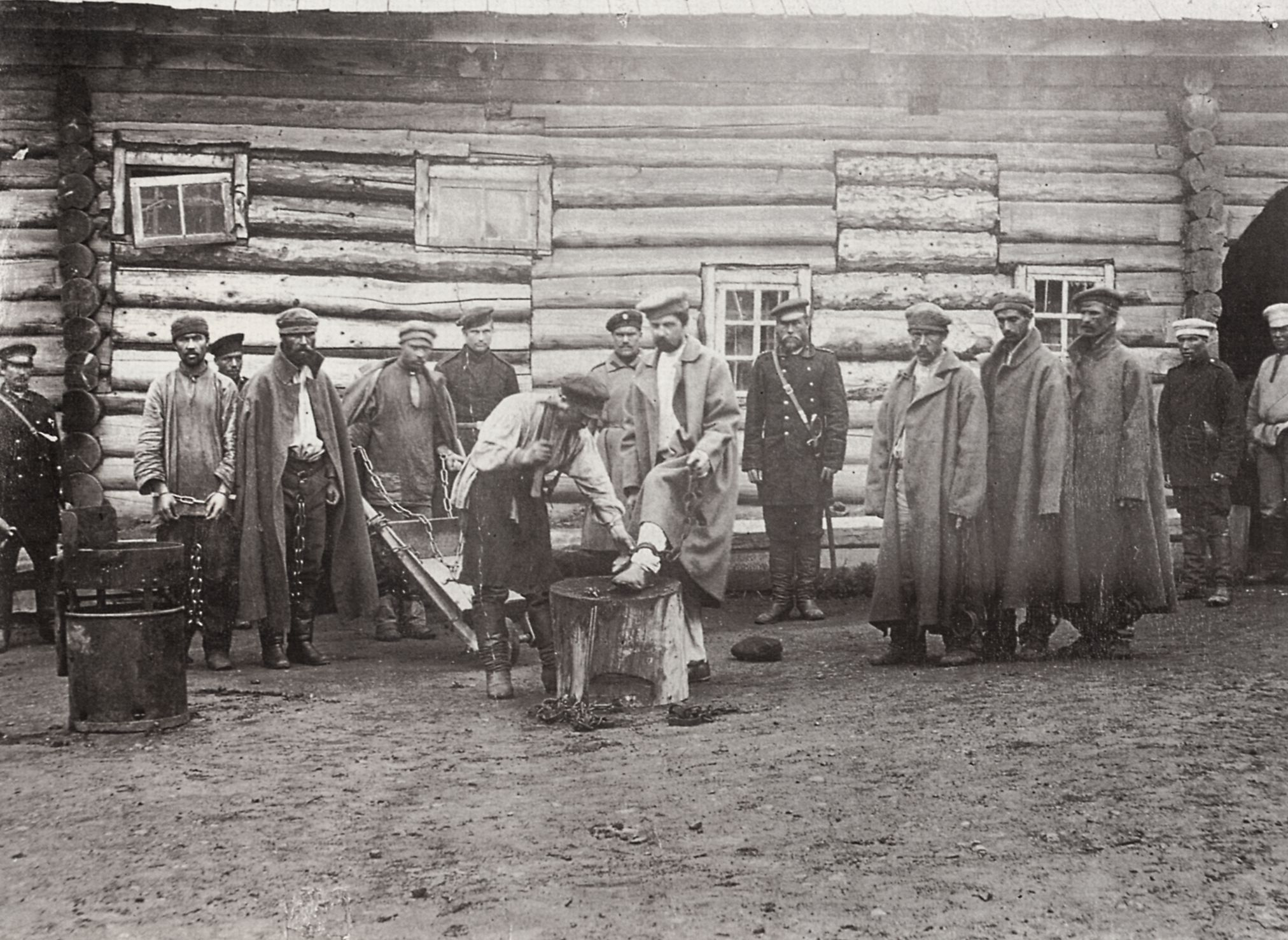 Pavlovskij, I.I.: Im Duiskaja (russ. Дуйская) Gefängnis werden die Gefangenen vor der Arbeit angekettet. Sachalin